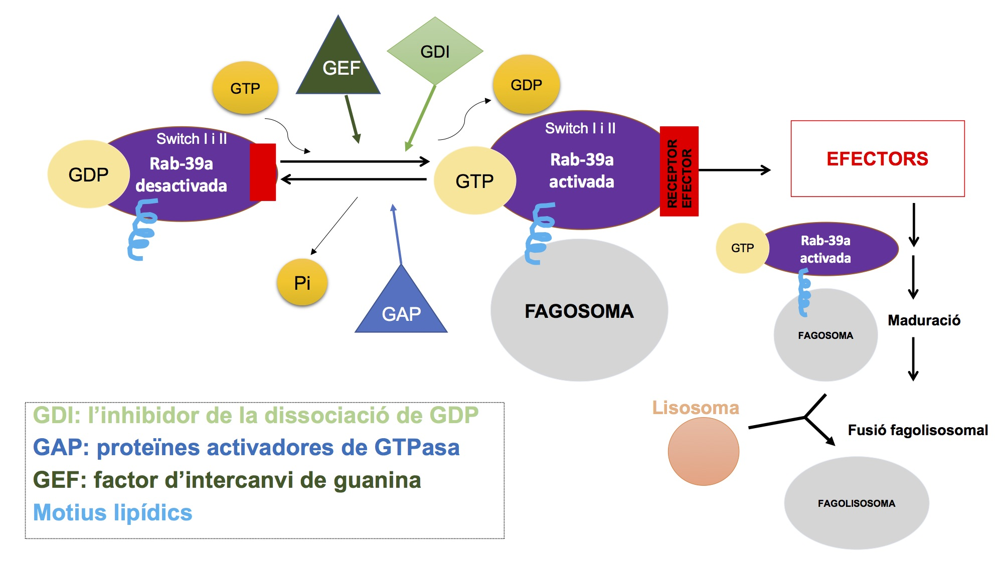 l procés d'activació de Rab-39a es mostra en la figura. Primer, està la Rab-39a en forma desactivada unida a un GDP. Gràcies a l'actuació del GEF, el GAP, el GDI i les molècules adicionals de GTP, GDP i Pi, es produeix la fosforilació i la molècula unida a Rab-39a passa a ser GTP, i així s'activa. La regió Switch I i II és responsable del canvi conformacional del procés d'activació. Ara, els motius lipídics poden ancorar a Rab-39a al fagosoma. El Receptors d'efectors s'uneixen als efectors, i comença el procés de maduració fagosomal, i després, el procés de fusió fagolisosomal, d'un lisosoma i un fagosoma, produïnt un fagolisosoma.